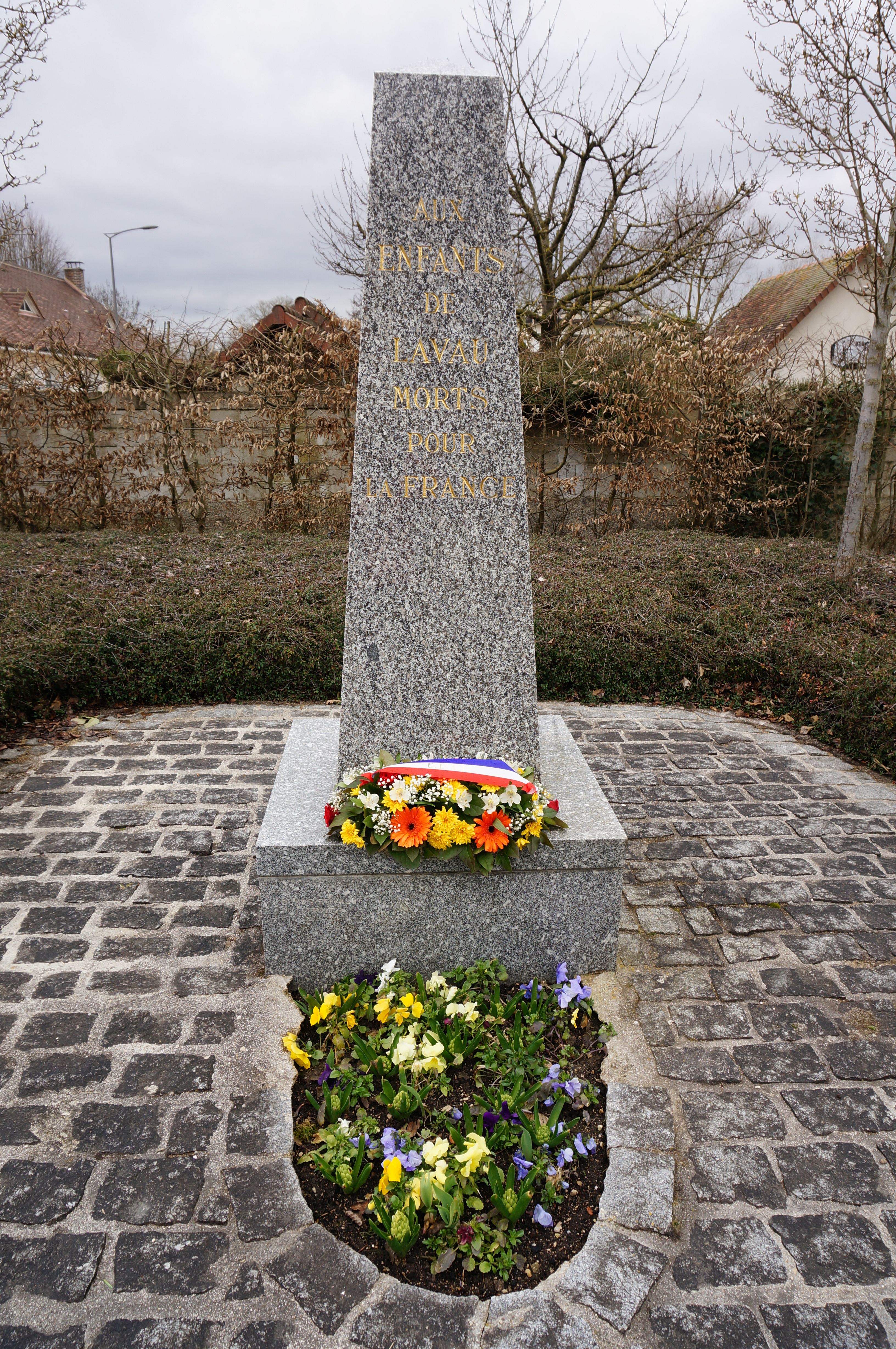 à Lavau.